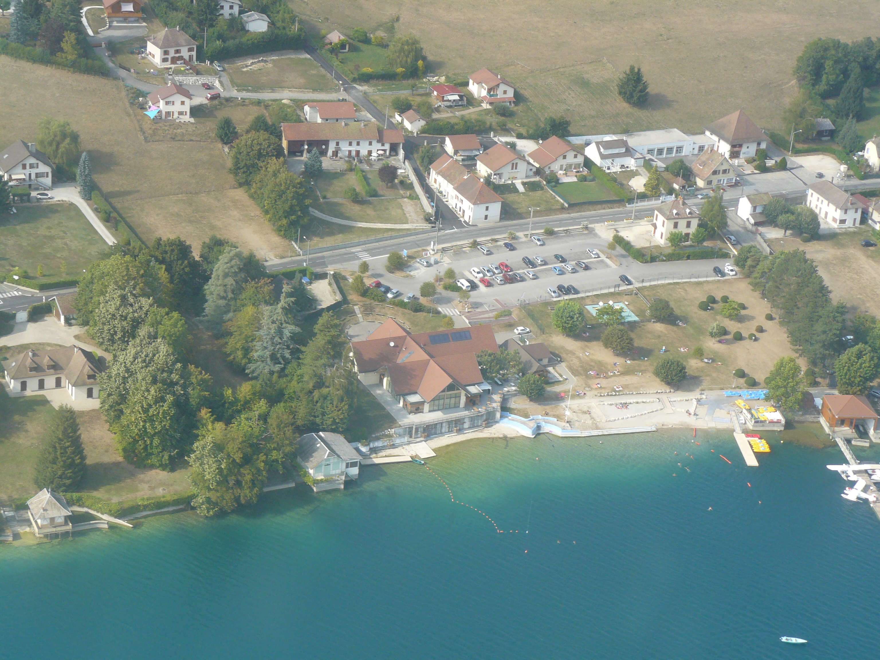 La plage de Paladru au bord du lac du même nom